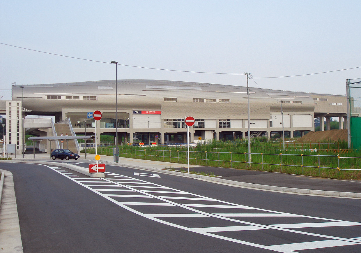 つくばエクスプレス柏たなか駅